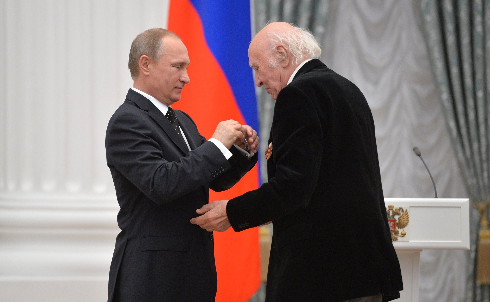 Церемония вручения государственных наград Российской Федерации